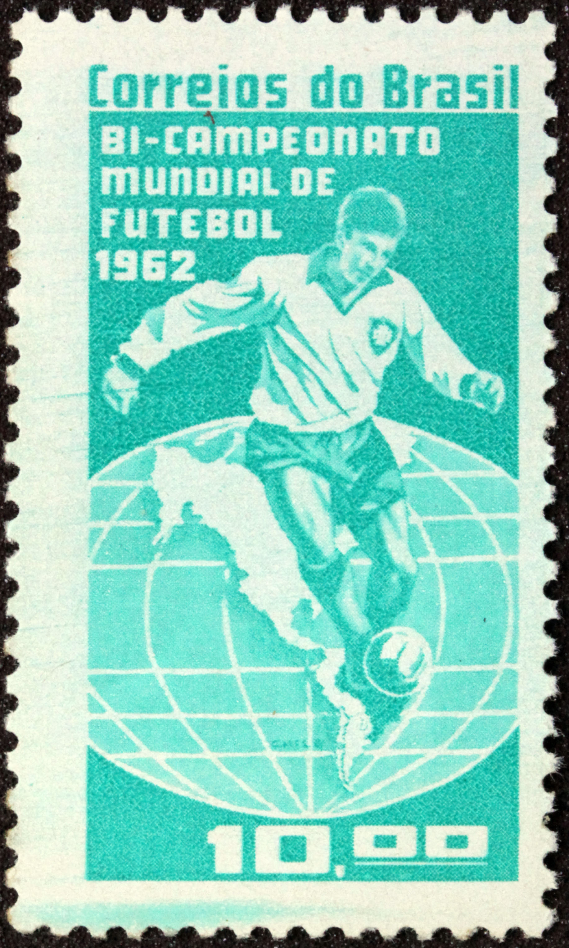 Selo Comemorativo do Campeonato Mundial de Futebol de 1962 (Copa do Mundo de 62).